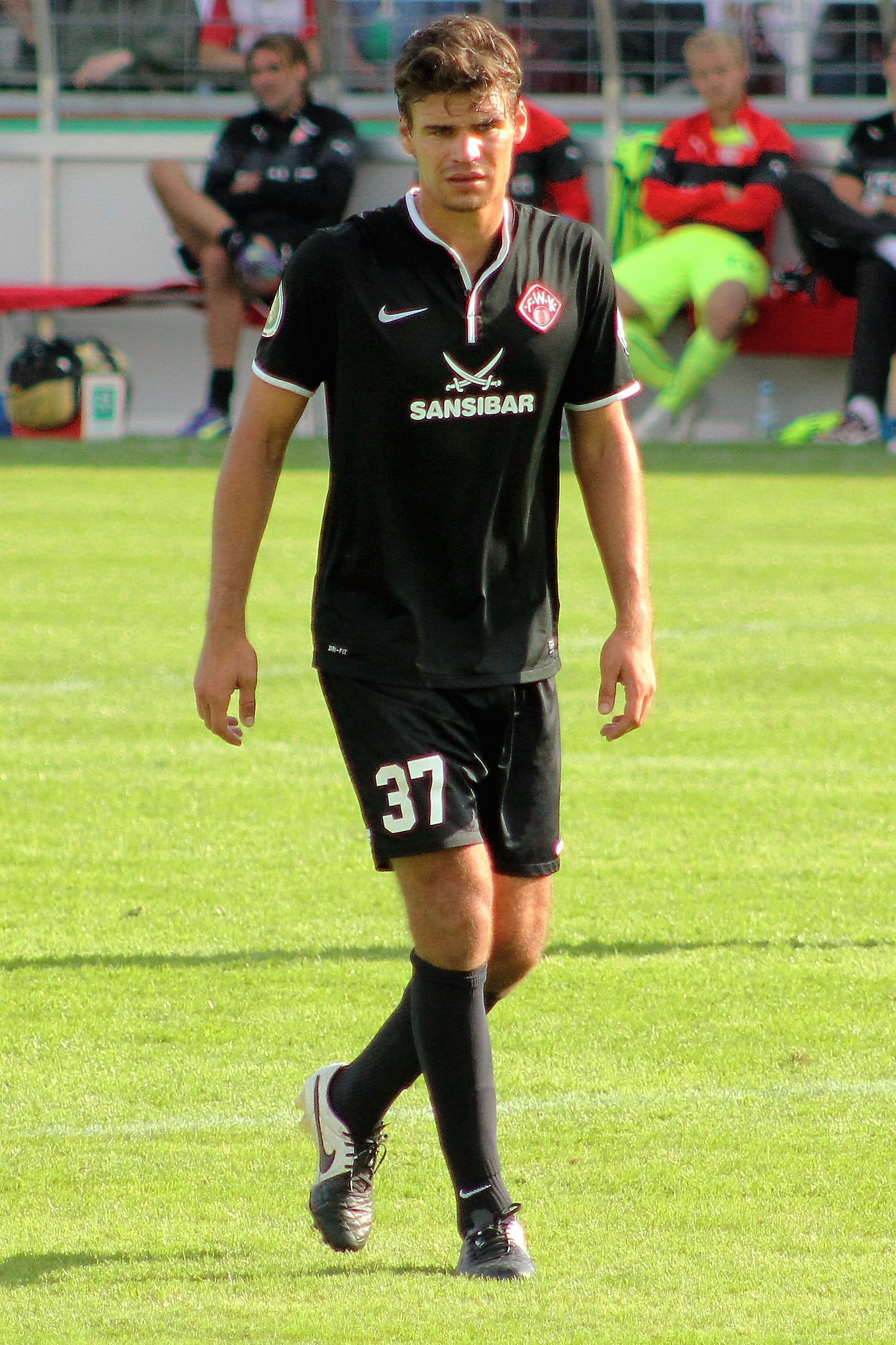 Christopher Bieber Würzbürger Kickers